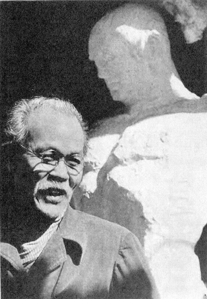 新潮社『芸術新潮』第4巻第3号（1953）より北村西望